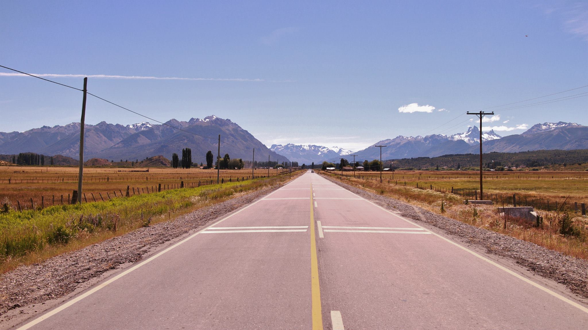 Imágenes paisajísticas.